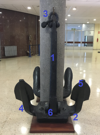 Aingura baten atalak